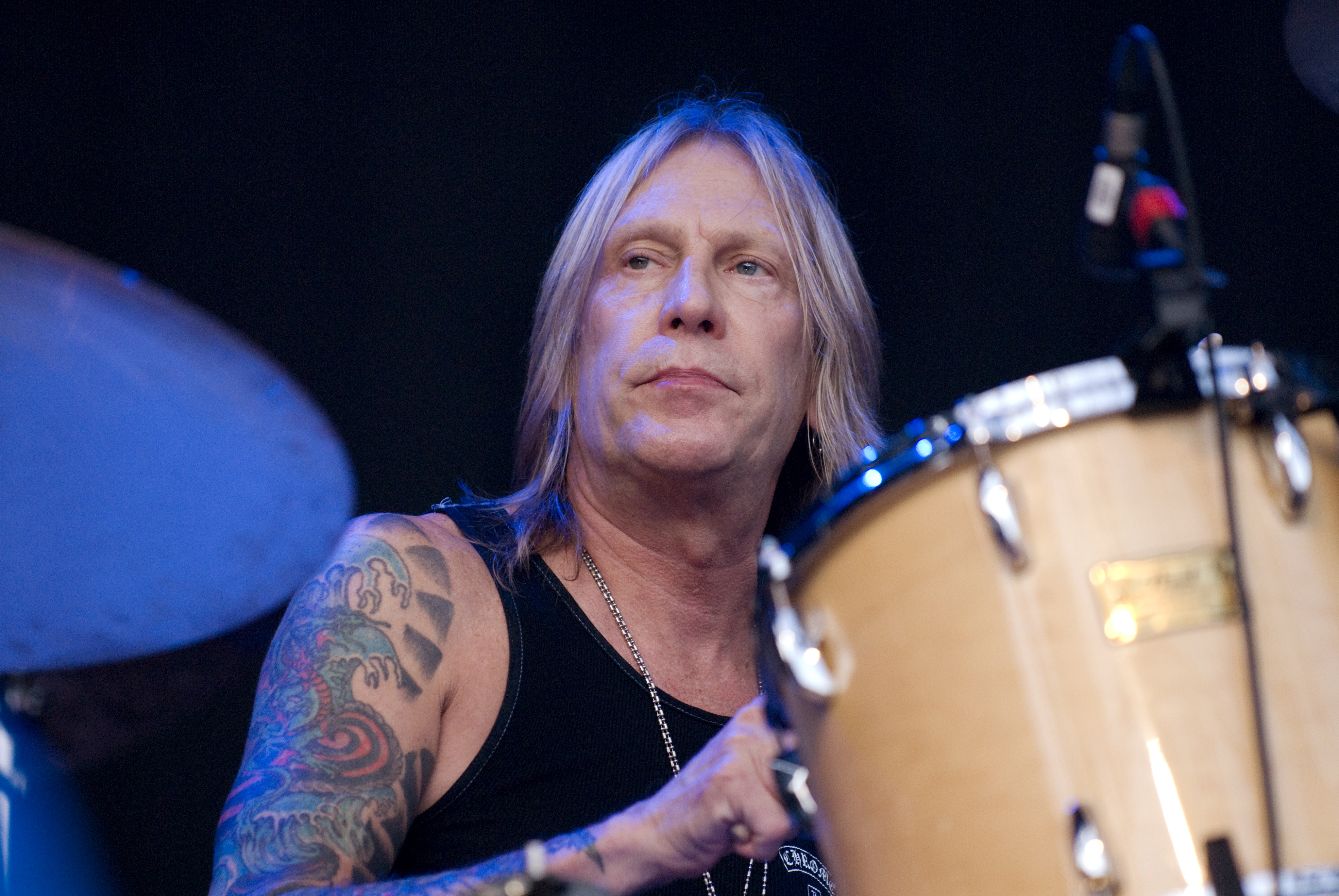 Gov't Mule